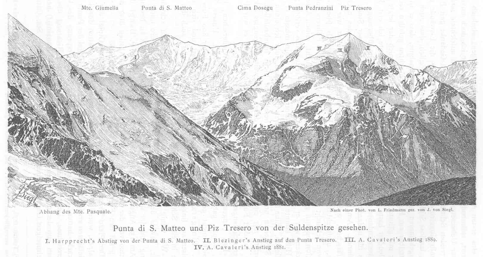 Punta San Matteo e Pizzo Tresero